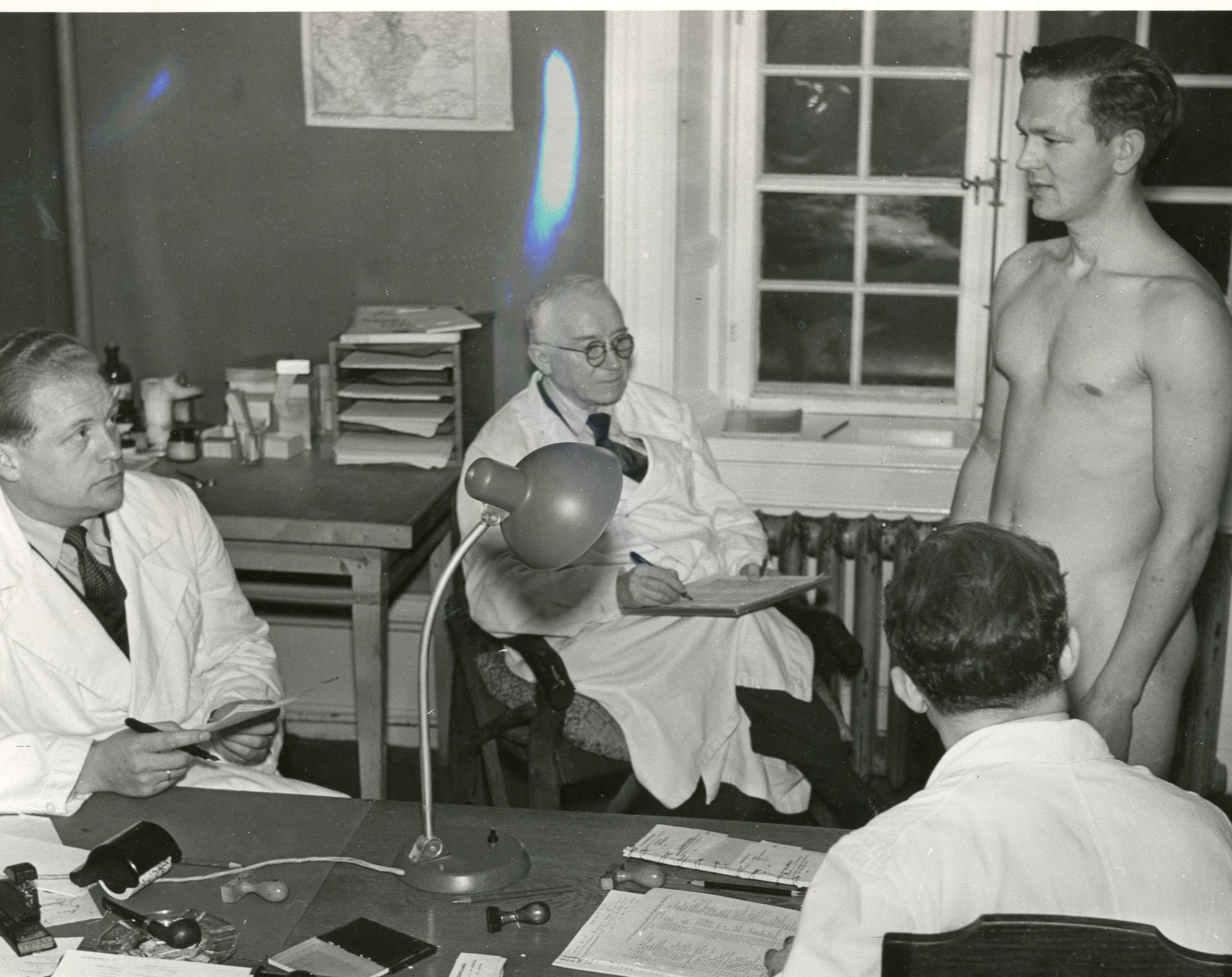 (u.n. uten tekst. Gjelder legeundersøkelse, ant. For utvalg til polititropper.)